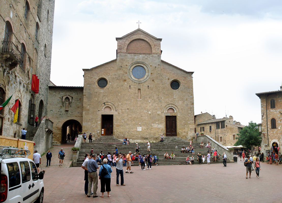 Colegiada de S. Gimignano